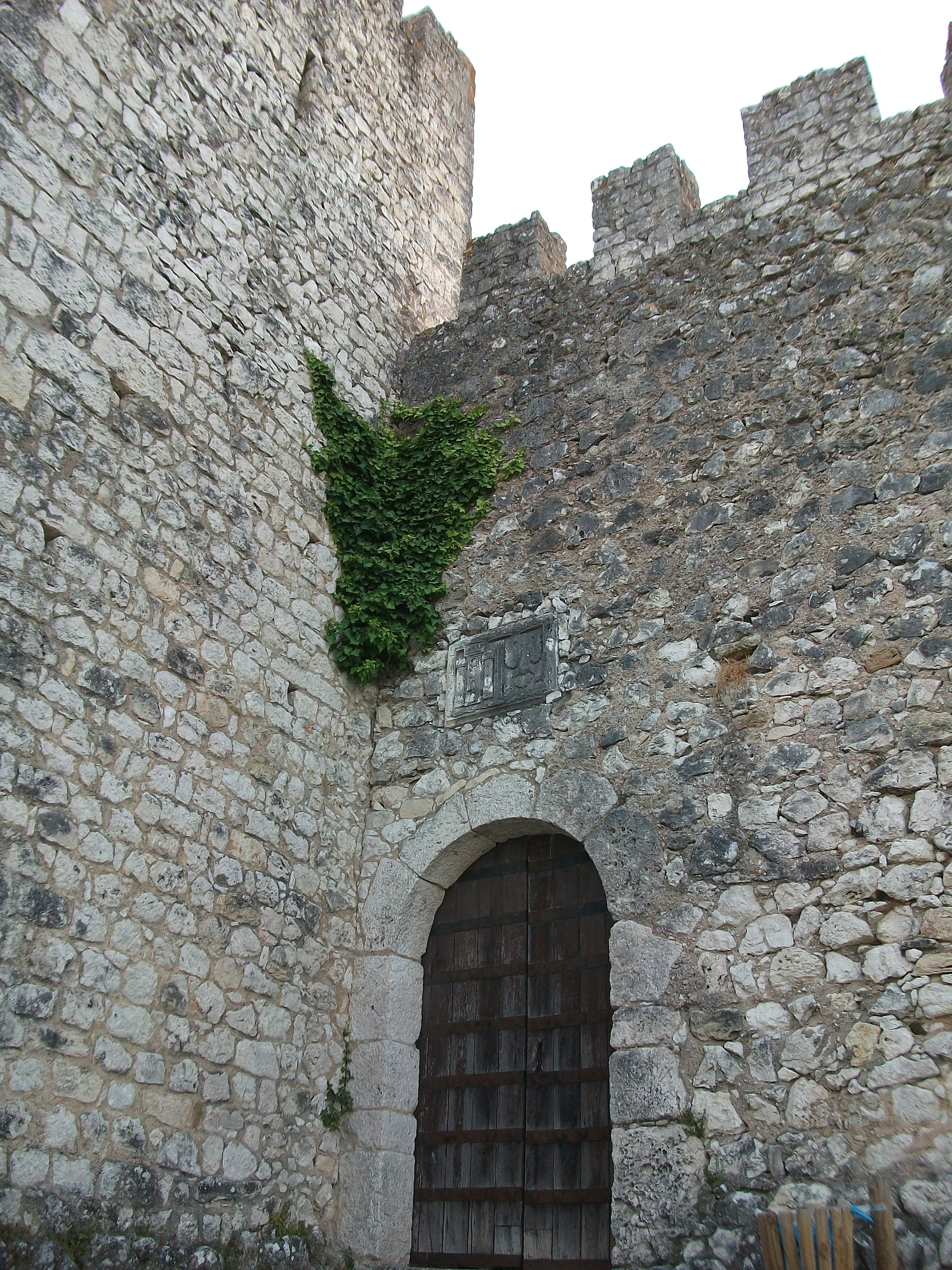 Porta de entrada do Castelo de Alcanede, Portugal.